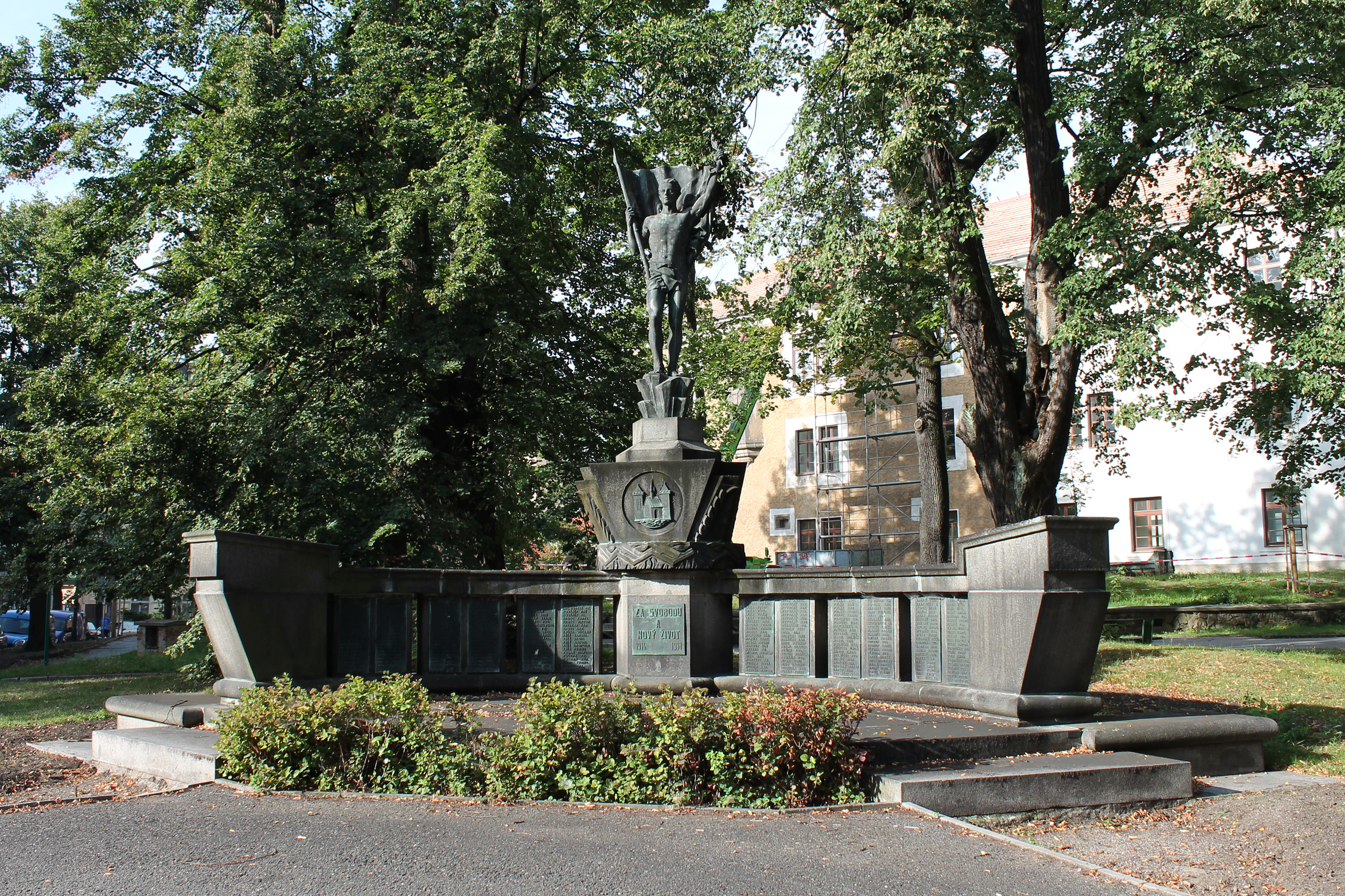 Příbram, pomník padlým v 1. světové válce (pomník Svobody) poblíž Zámečku-Ernestina. Podle návrhu architekta Jana Kotěry a sochaře Jana Štursy z roku 1917 zhotovil Václav Šára roku 1927.